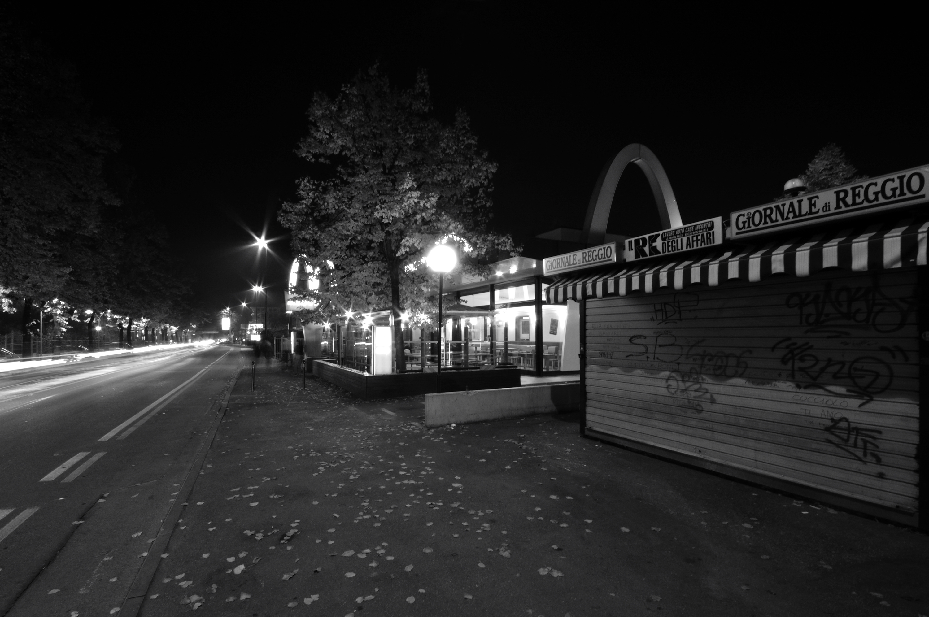 Via Emilia all'Ospizio - Reggio Emilia, Italia